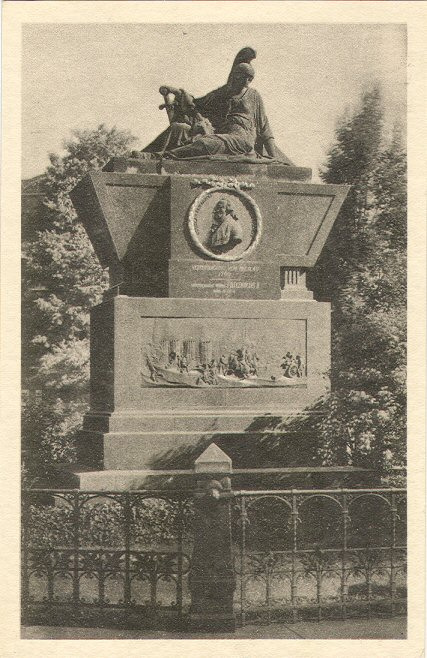 Das Grabdenkmal des Generals Friedrich Bogislav Graf von Tauentzien auf dem Tauentzien-Platz in Breslau.